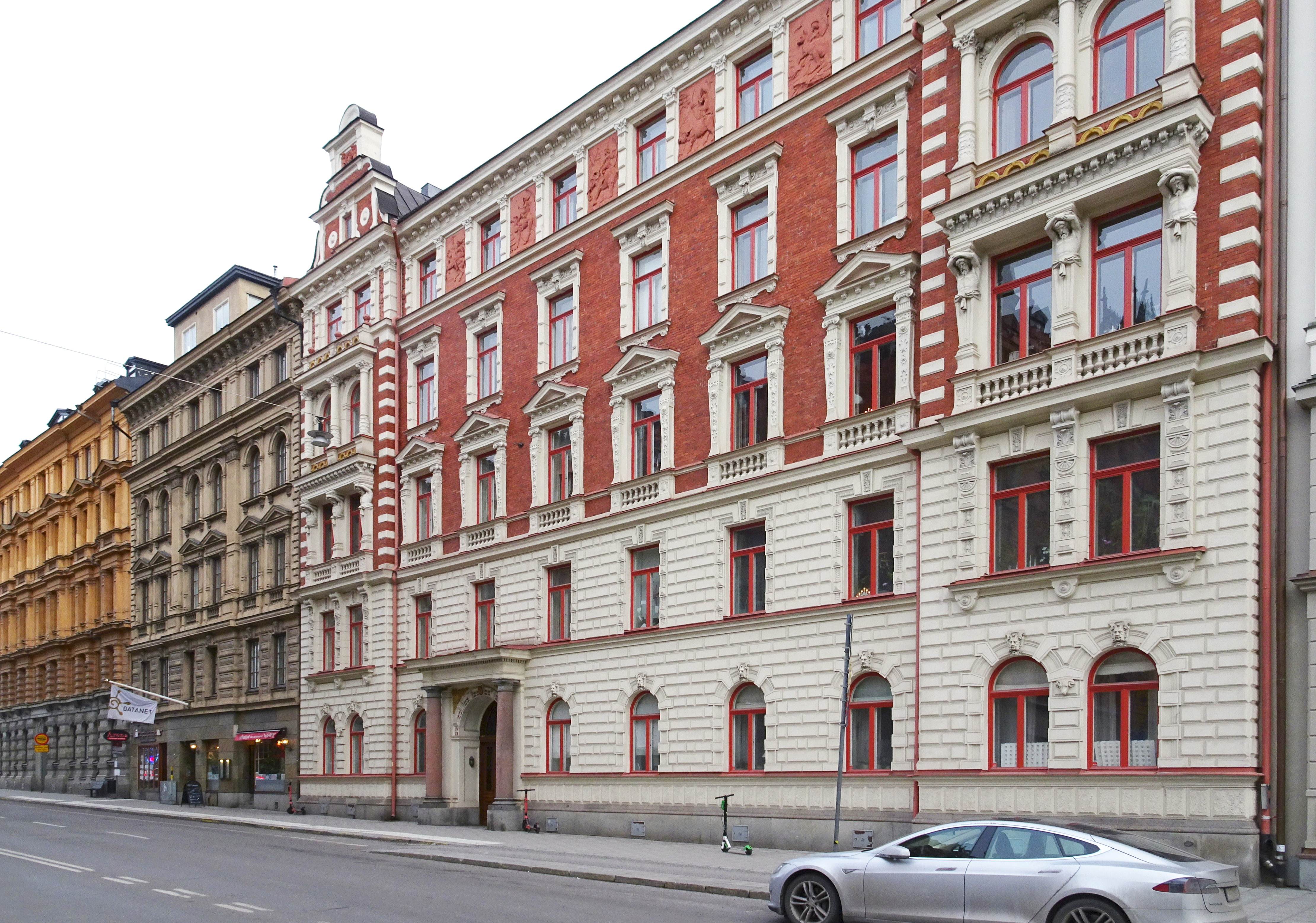 Sturegatan 60, Älgen 23, byggår 1888-1889. Johan Laurentz (Arkitekt), Lars Magnus Elfling (Byggherre), Lars Magnus Elfling (Byggmästare)